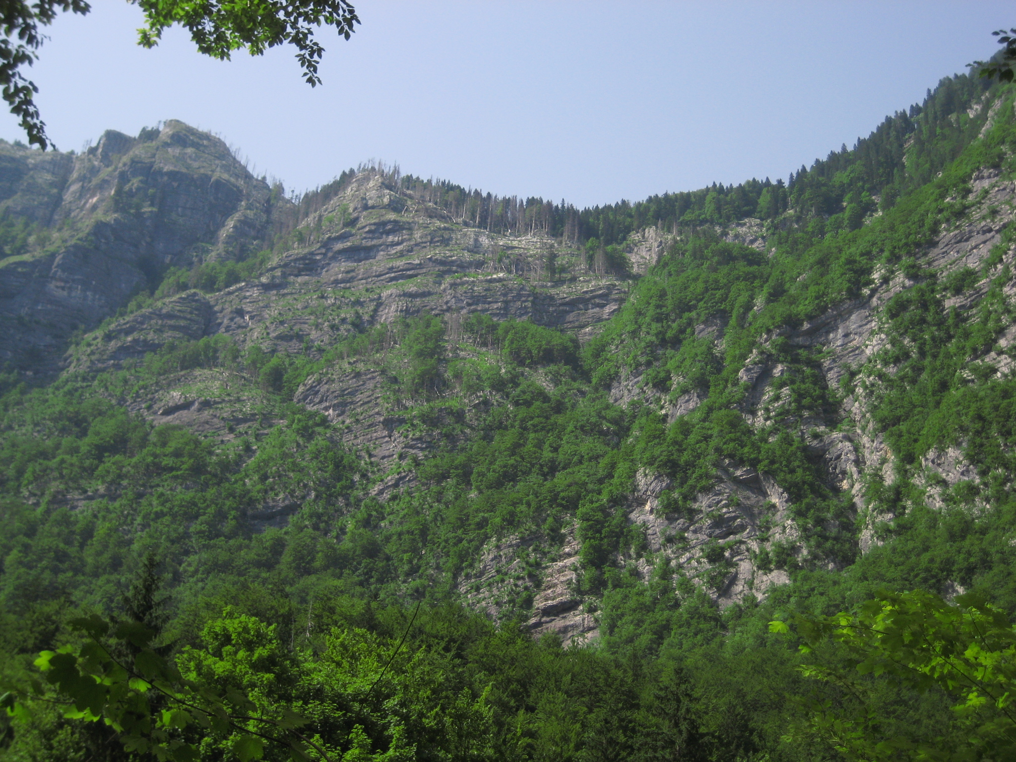 Komarča, mountain in Slovenia, near Bohinj. photo:Ziga (talk) 12:56, 1 July 2008 (UTC) 06-2008